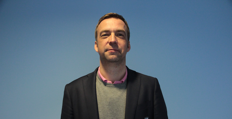 Allan Kuhn Actual entrenador de Malmö FF